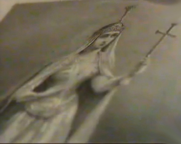 "წმინდანთა კრებული" ილუსტრაცია. საქართველოს საზოგადოებრივი მაუწყებლის რეპორტაჟი.